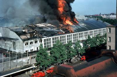 Vanhan Messuhallin palo kesäkuun 16. päivä 1966. Kuva otettu Mannerheimintie 70:n katolta.